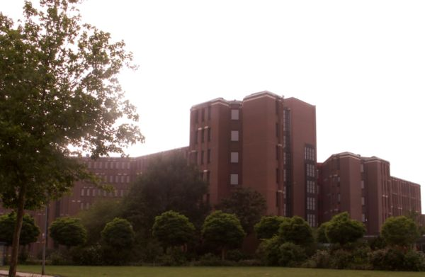 Heinsberger Land, Kreisverwaltung Heinsberg, Valkenburger Straße